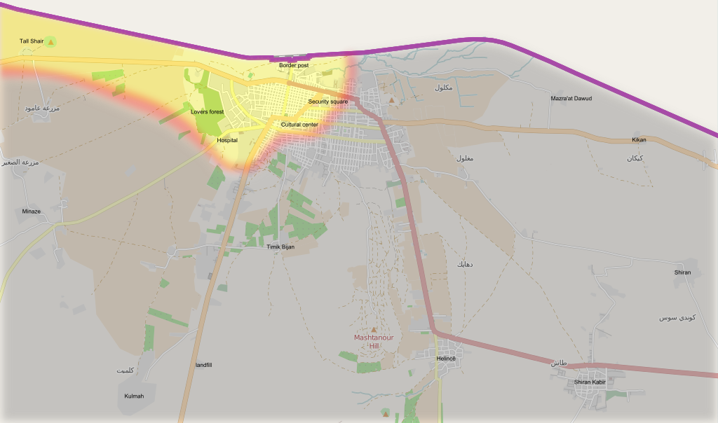 Front de Kobané, octobre 2014.